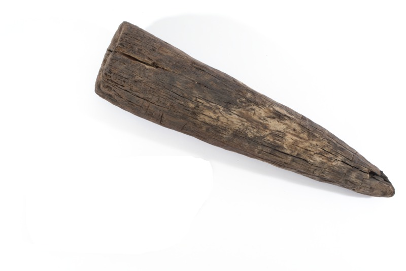 Punta di palo di palafitta a sostegno della piattaforma lignea su sui poggiavano le abitazioni.